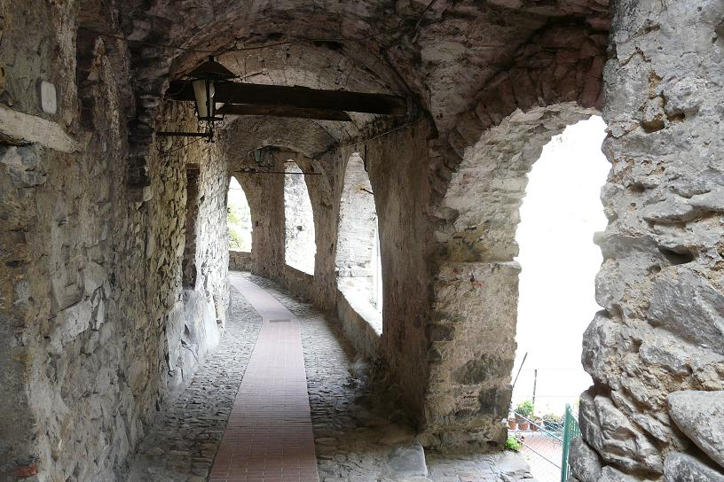 Ceriana, Liguria, Italia